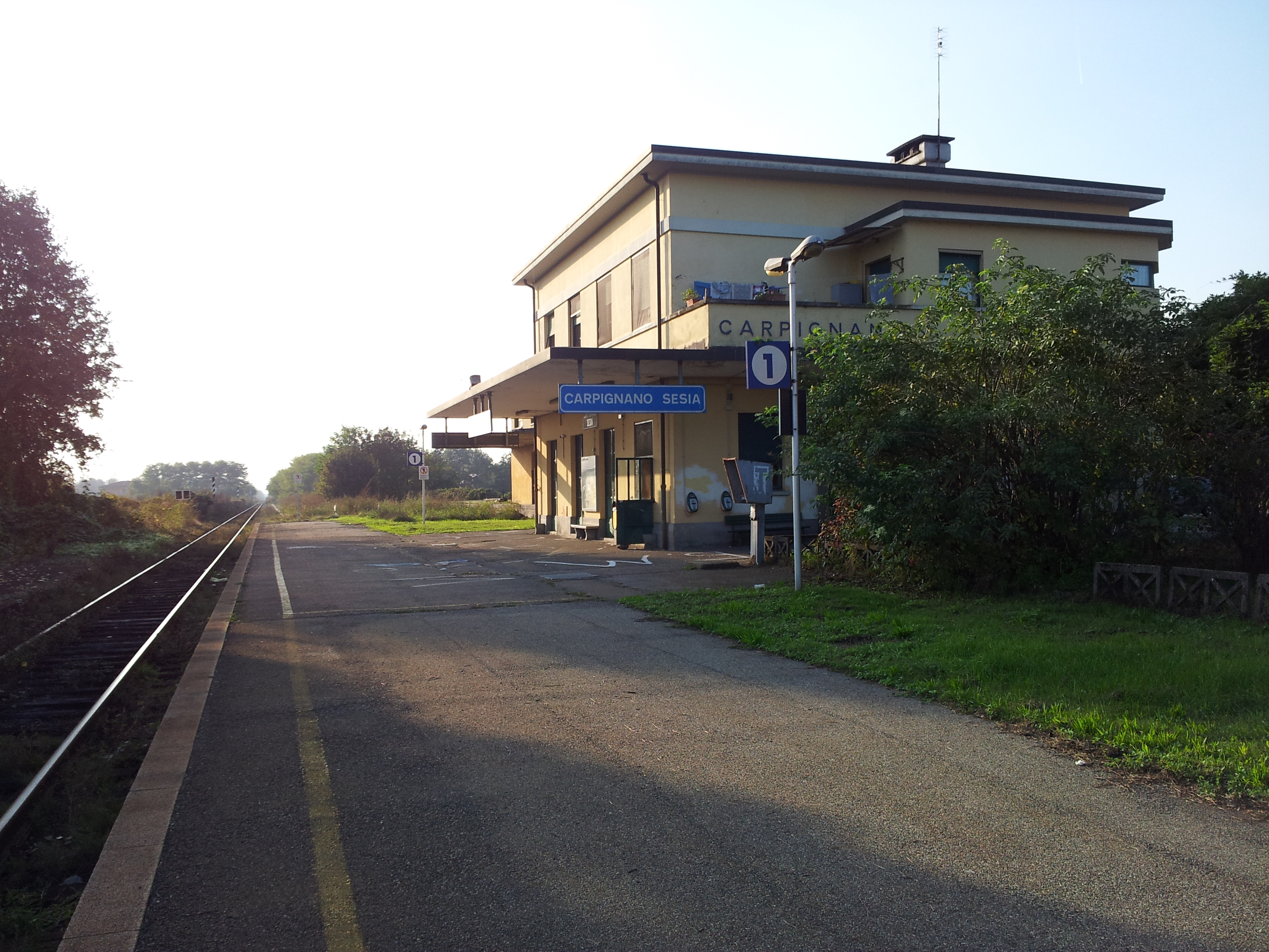 Fermata lato binari, in direzione Biella.